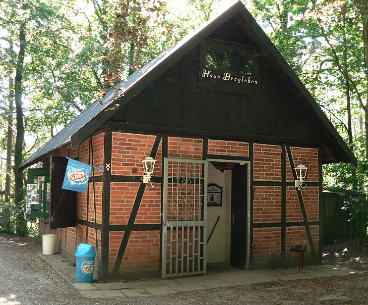 Haus_Bergleben am Wilhelmsturm